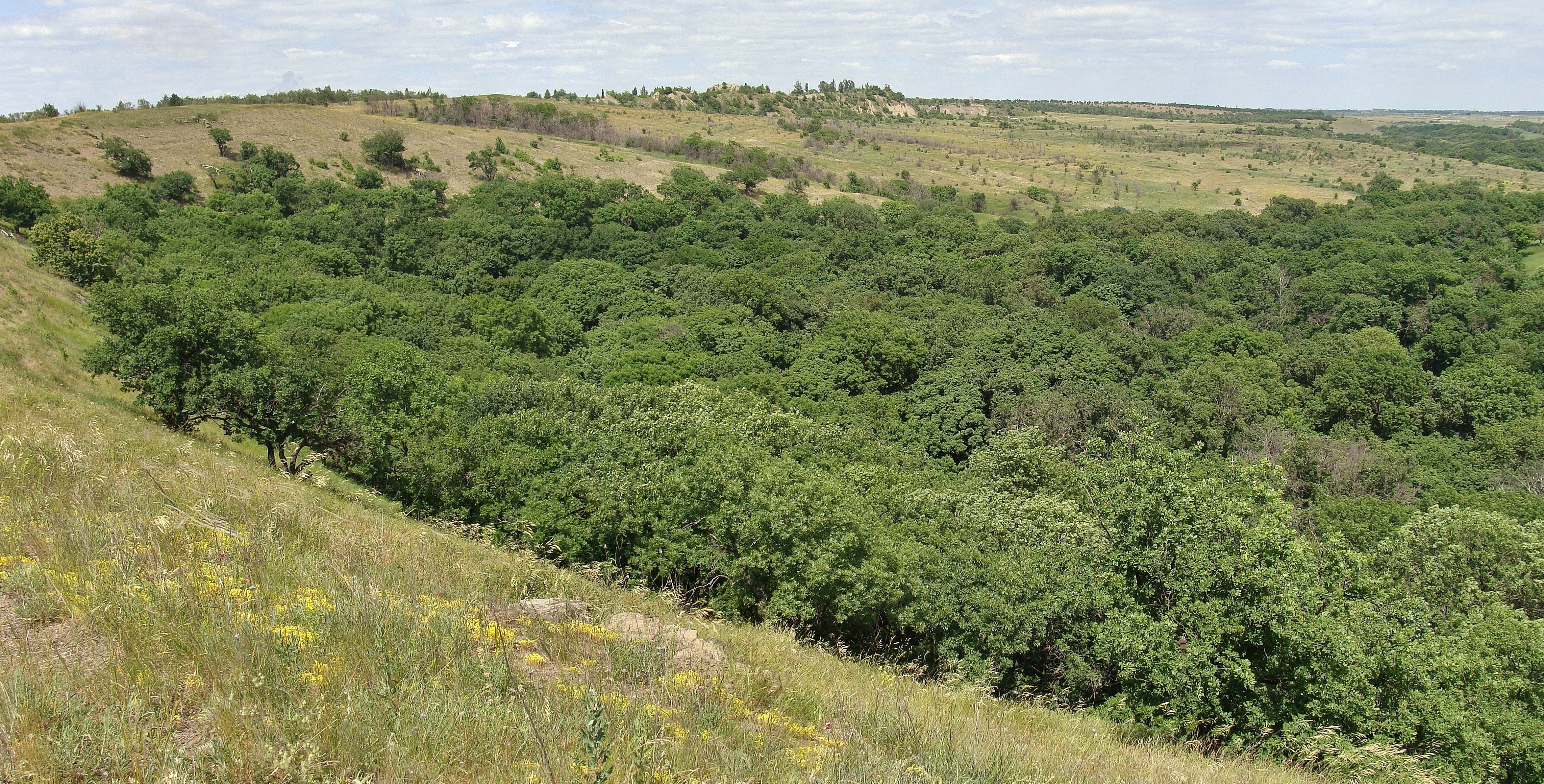 Склон балки.